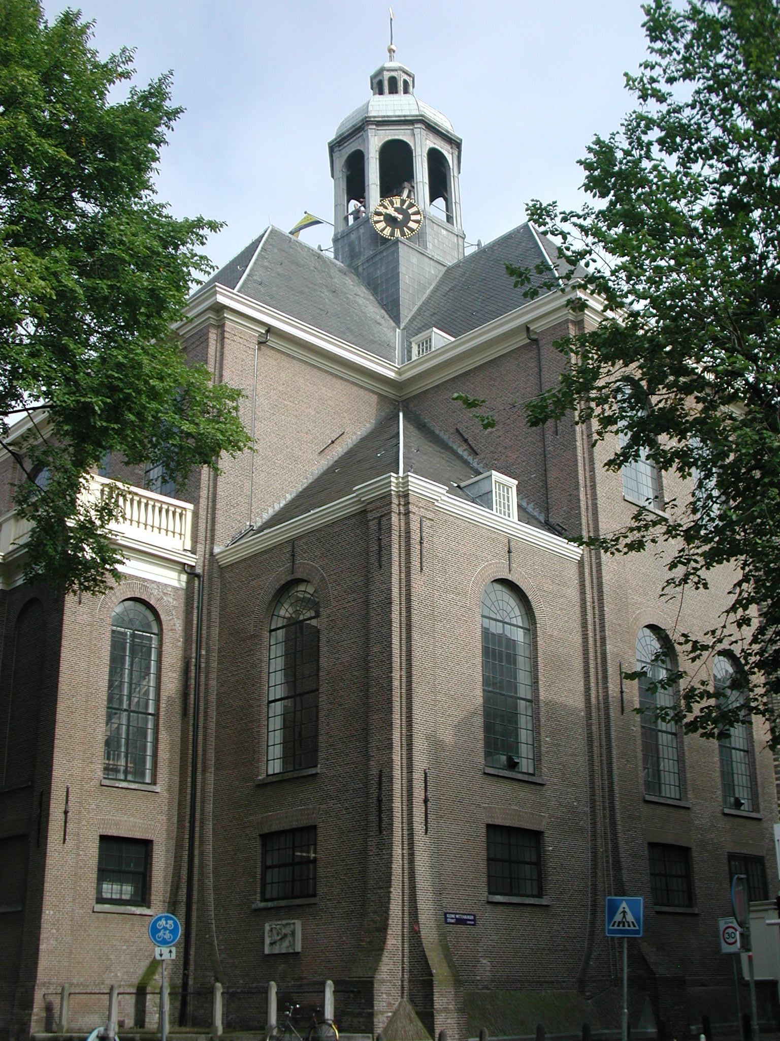 Amsterdam: Oosterkerk, East Church